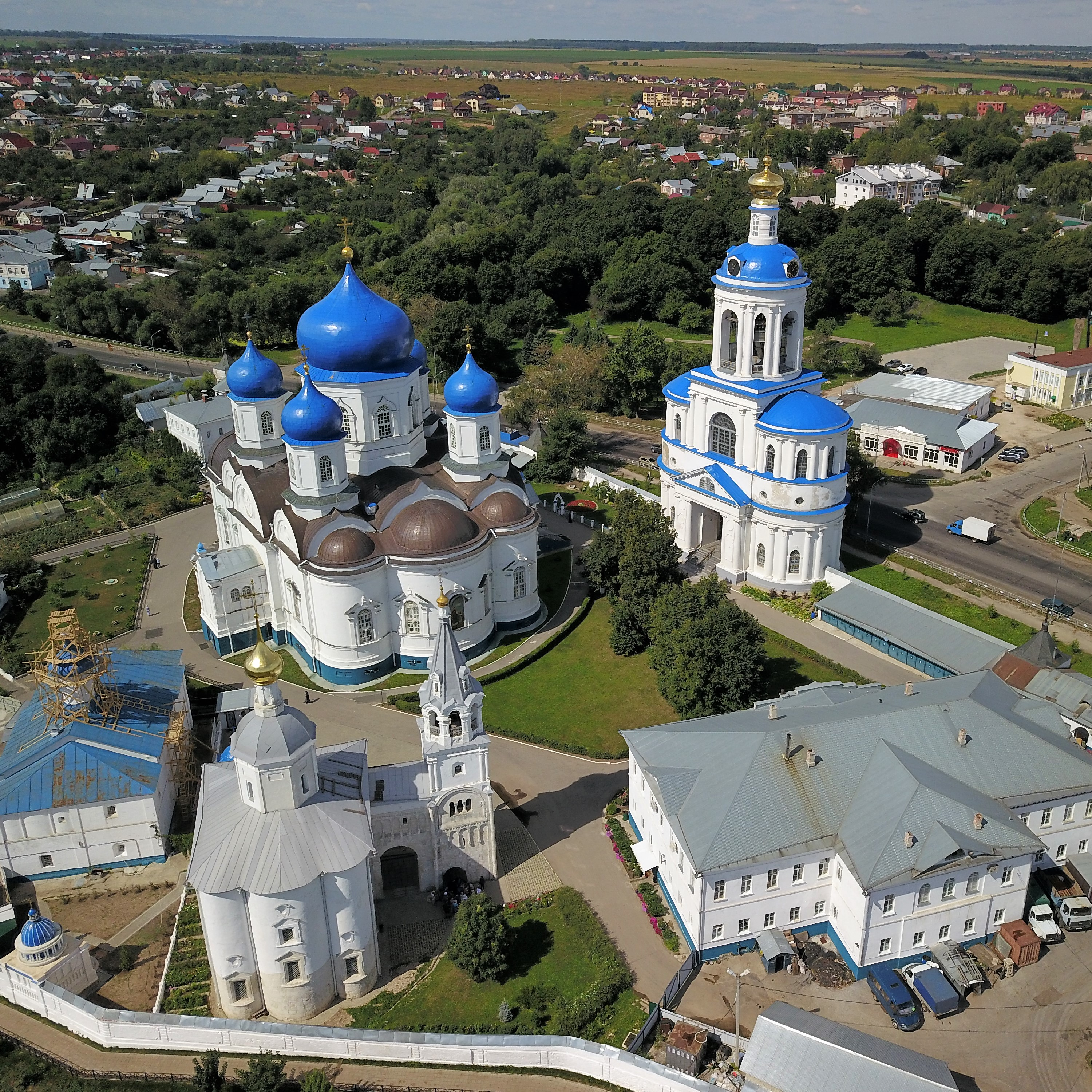 Ансамбль Боголюбовского монастыря (монастырь Боголюбский): Боголюбово, Суздальский район, Владимирская область